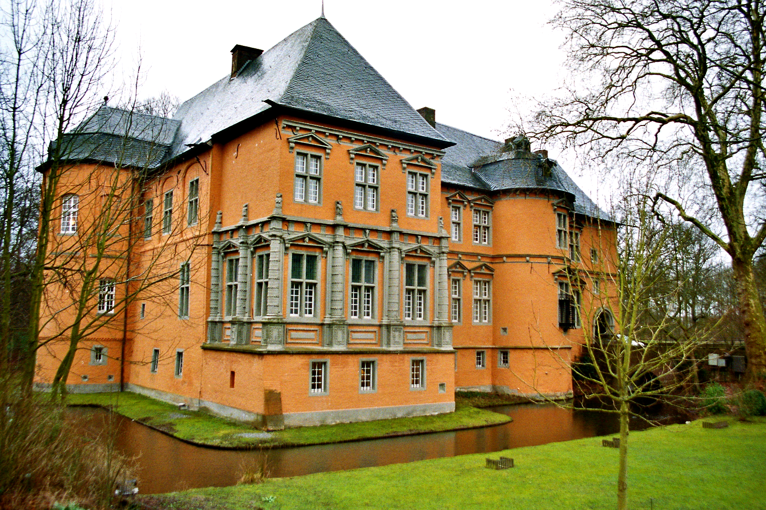 Das Schloss, auch Ritterschloss genannt ist das bedeutendste Baudenkmal der Stadt Mönchengladbach am Niederrhein. Es liegt im Stadtbezirk Rheydt. Erstmals erwähnt wurde es 1180 in einer Urkunde des Kölner Erzbischofs Philipp von Heinsberg. Wahrscheinlich ist die heutige Anlage der Nachfolgebau einer Turmhügelburg, einer sogenannten Motte. Grabungsfunde weisen darauf hin. Der nachweislich älteste aus Stein gebaute Bau lässt sich auf Anfang des 14 Jhd. datieren, war etwa 12X12 m in der Grundfläche und hatte im Süden einen Turm. Gerhard II von Rheydt wird 1443 wegen andauernden Raubrittertums mit der Reichsacht belegt und 1464 wird die Anlage durch die Kaufleute aus Lüttich und Köln wegen weiterhin anhaltender Strassenräuberei vollkommen zerstört. 1468 lässt Wilhelm V von Nesselrode die Anlage wieder aufbauen und zwar wesentlich größer als die Vorgängerburg. Die Fassadenlänge ist jetzt fast 46 m lang. Mitte des 16 Jhd wird dann die Burg zu einen repräsentativen Herrenhaus mit Vorburg, Torburg, Wallanlagen, und Bastionen ausgebaut. Aus dieser Zeit stammt auch das Aussehen der Anlage im italienische Renaissance Stil. Heute ist der größte Teil der Anlage für Besucher zugänglich, einschließlich der Wallanlagen und der Kasematten. Ausserdem beinhaltet das Schloß ein städtisches Museum mit Sammlungen der Kunst und Kultur aus der Renaissance und des Barocks. Die Aufnahmen wurden am Spätnachmittag des 6.März 2007 bei starken Regen mit einer Nikon F5 gemacht. Johannes Heribert Pohl